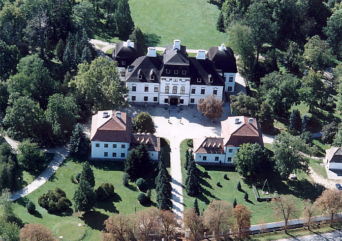 Gyülevizy-Pejacsevich-kastély, Zsira, Győr-Moson-Sopron megye